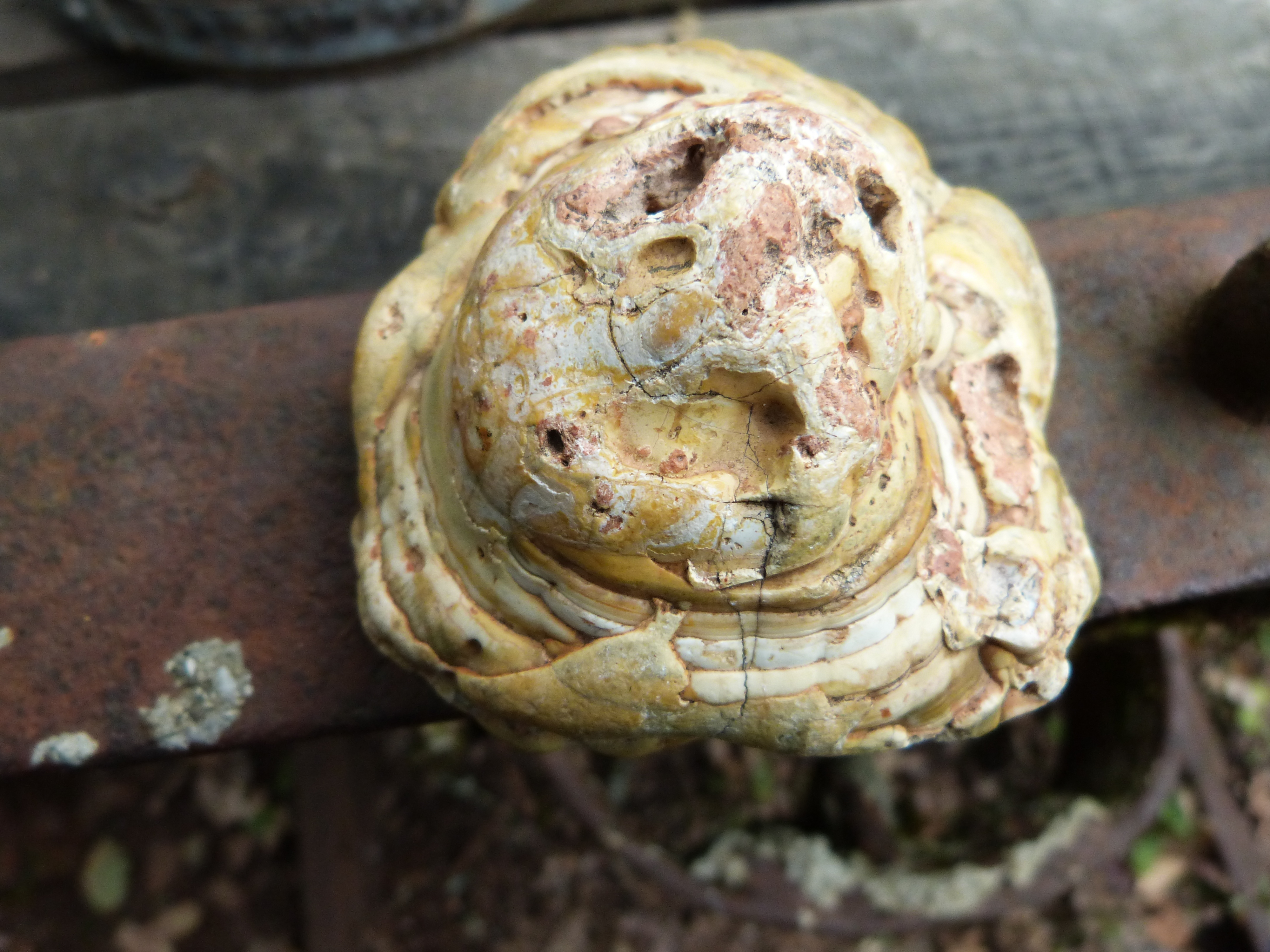 Phosphatière du Cloup d'Aural (Inscrit) .